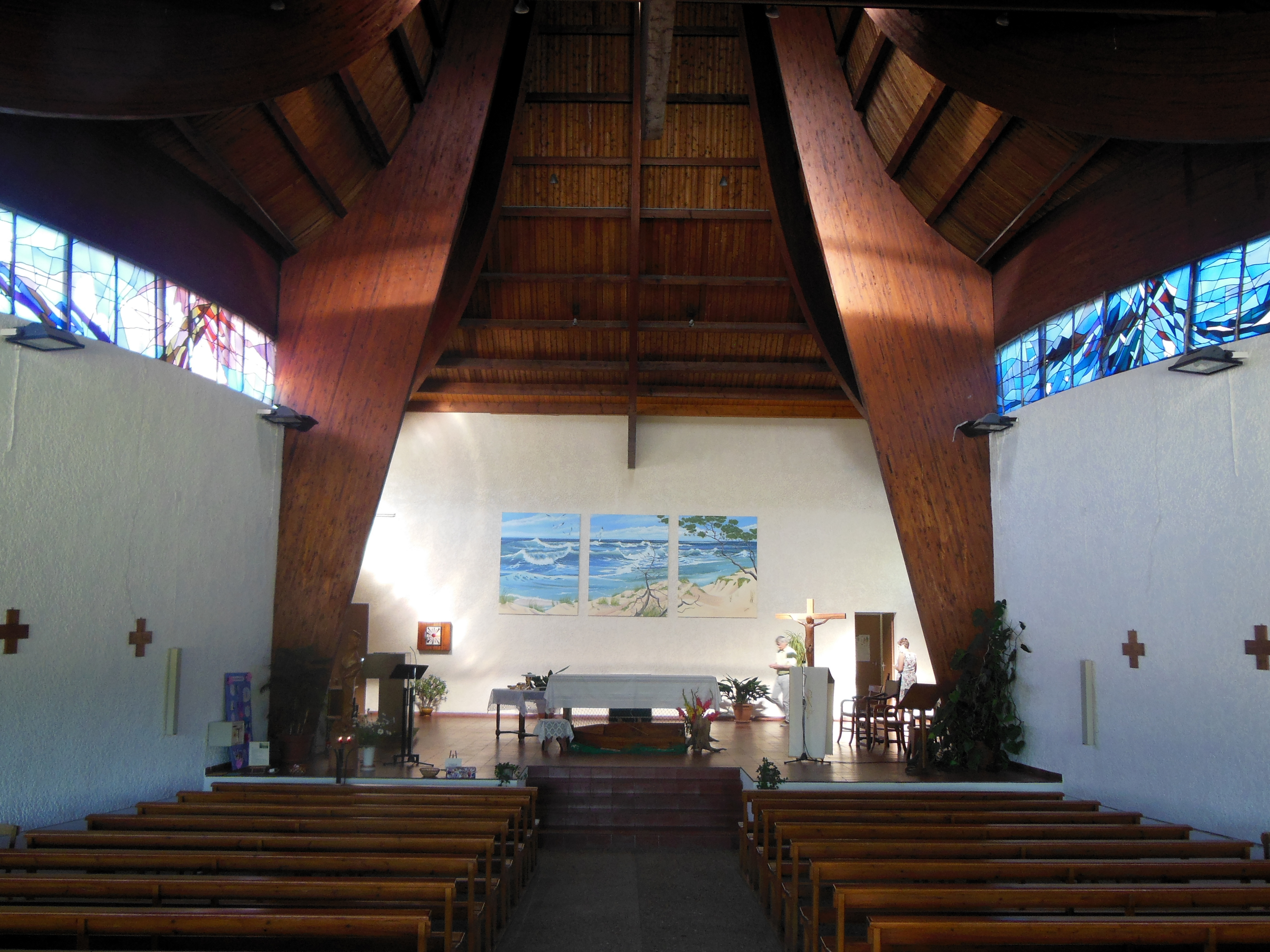 Chapelle Notre-Dame des Dunes de Mimizan-Plage (Landes, France). La nef et le chœur